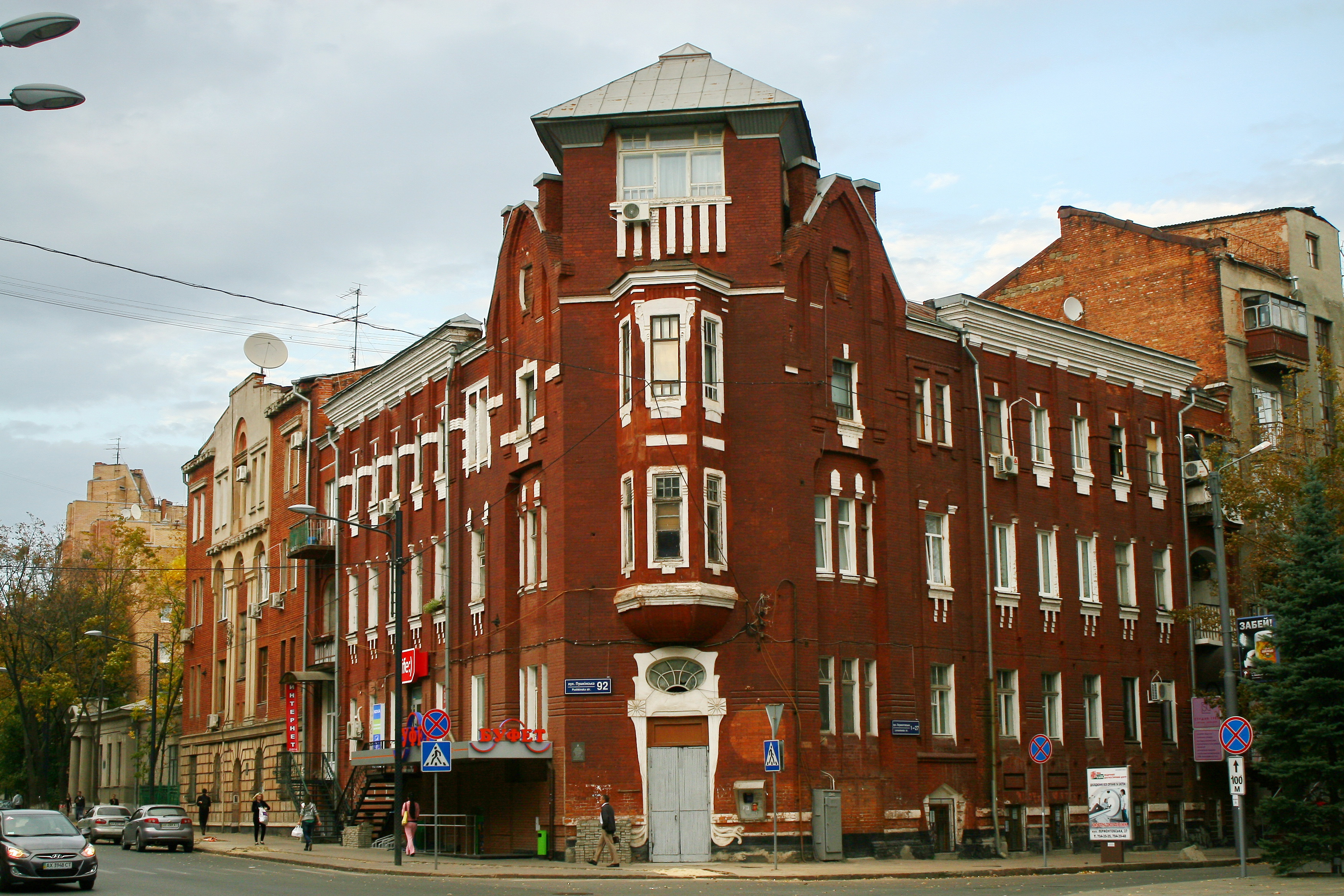 Будинок, у якому жив Лебедєв П.П., рад. військ. діяч